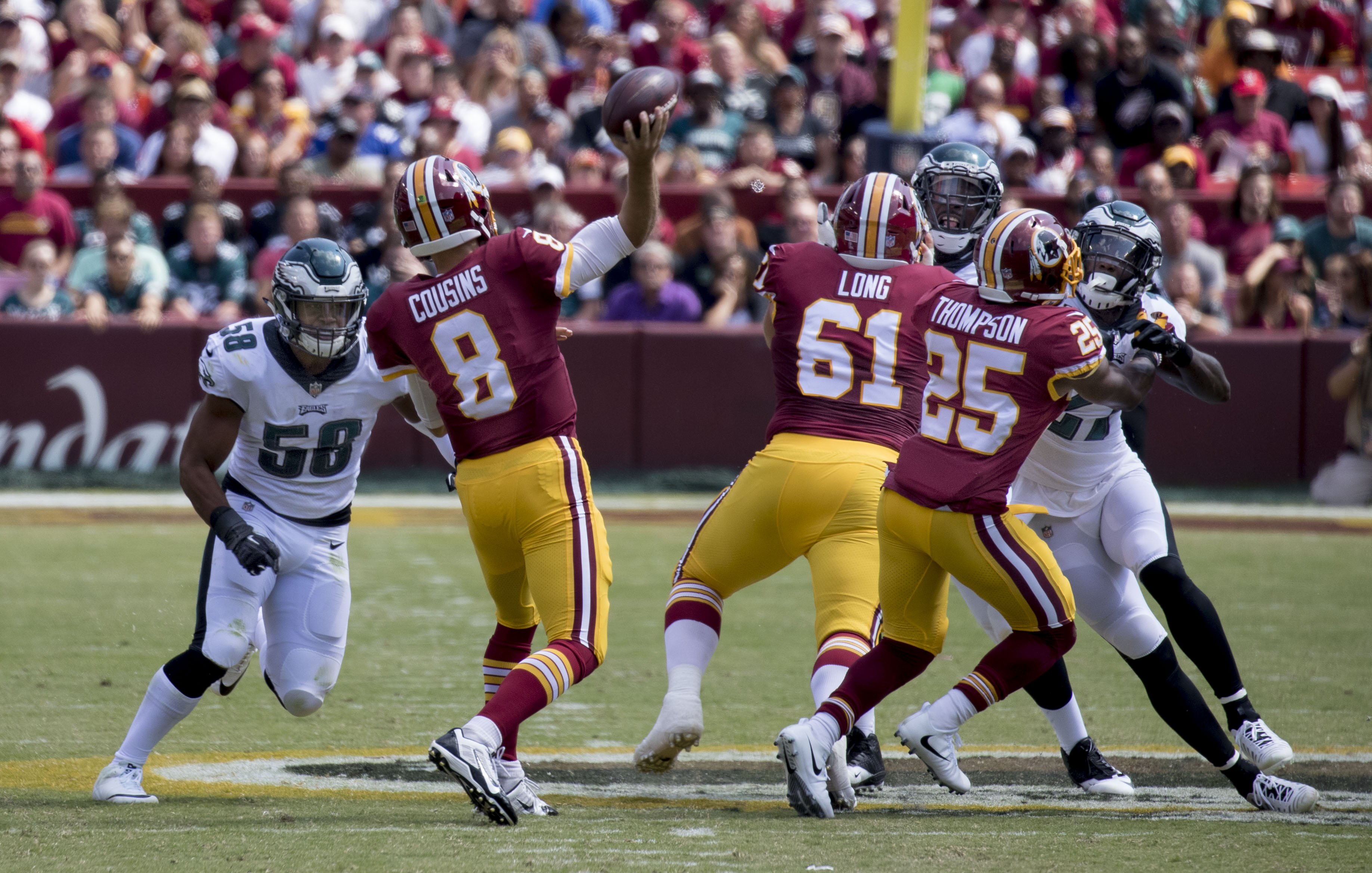 Eagles at Redskins 9/10/17